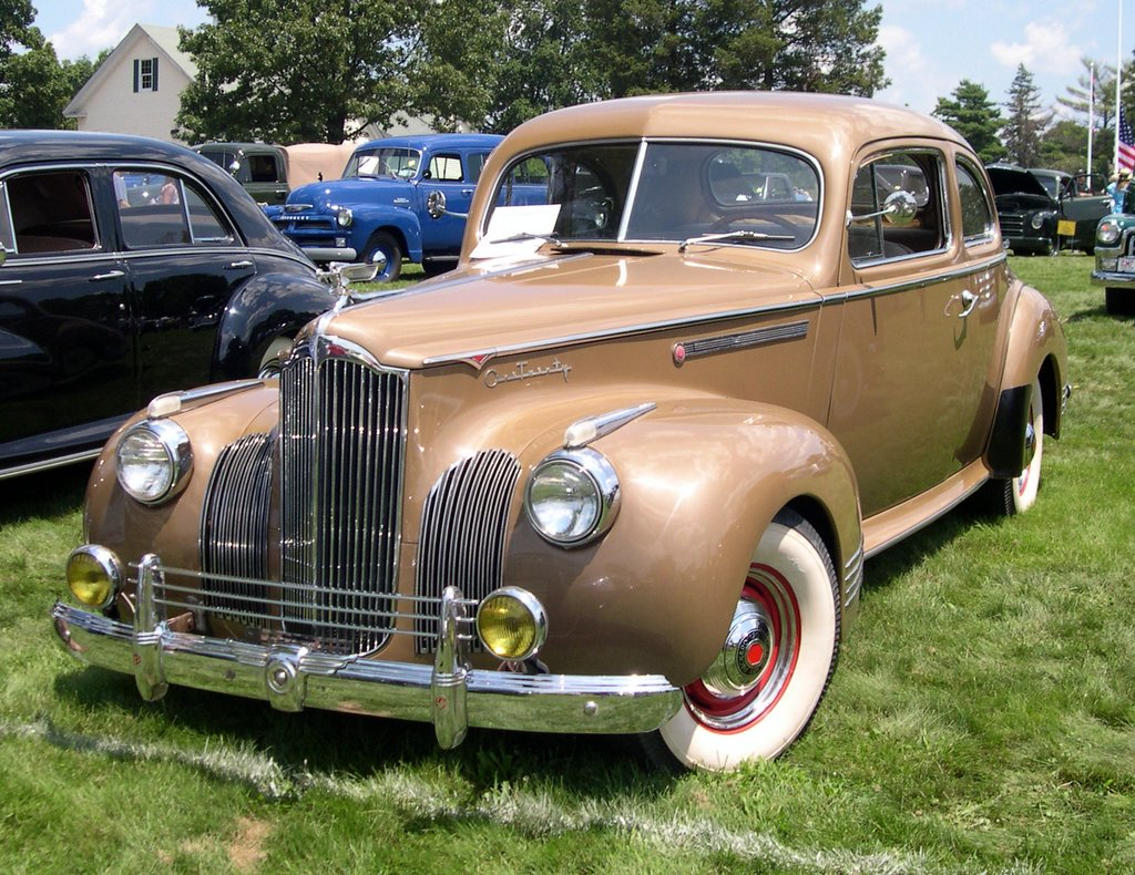 1941 Packard 120 coupe (model 1901)